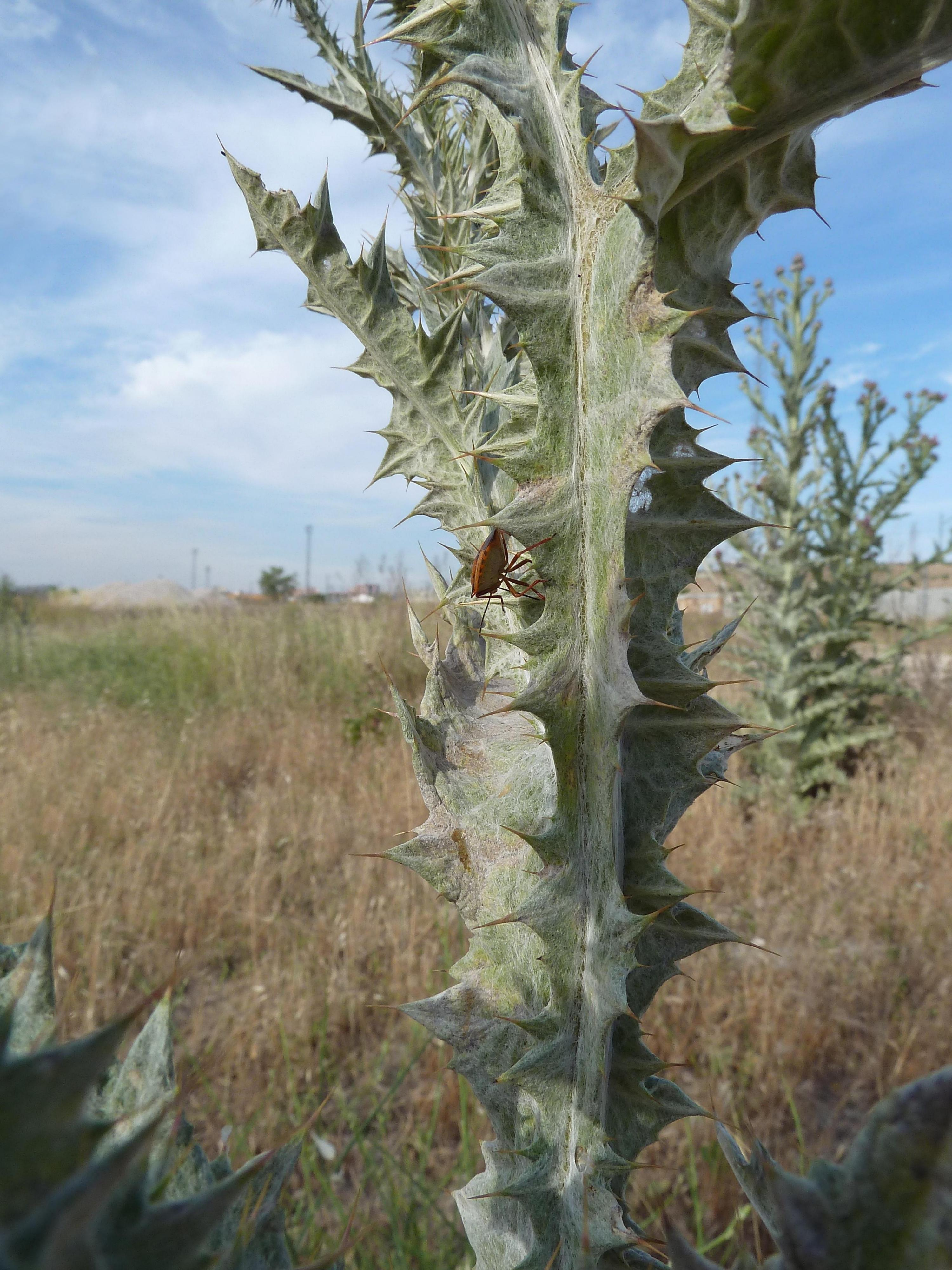 Onopordum acanthium var. acanthium - Detalle del tallo alado-espinoso densamente aracno-tomentoso. - Circa Estación de Contenedores de RENFE/ADIF de Abroñigal/Embajadores, Madrid (España).